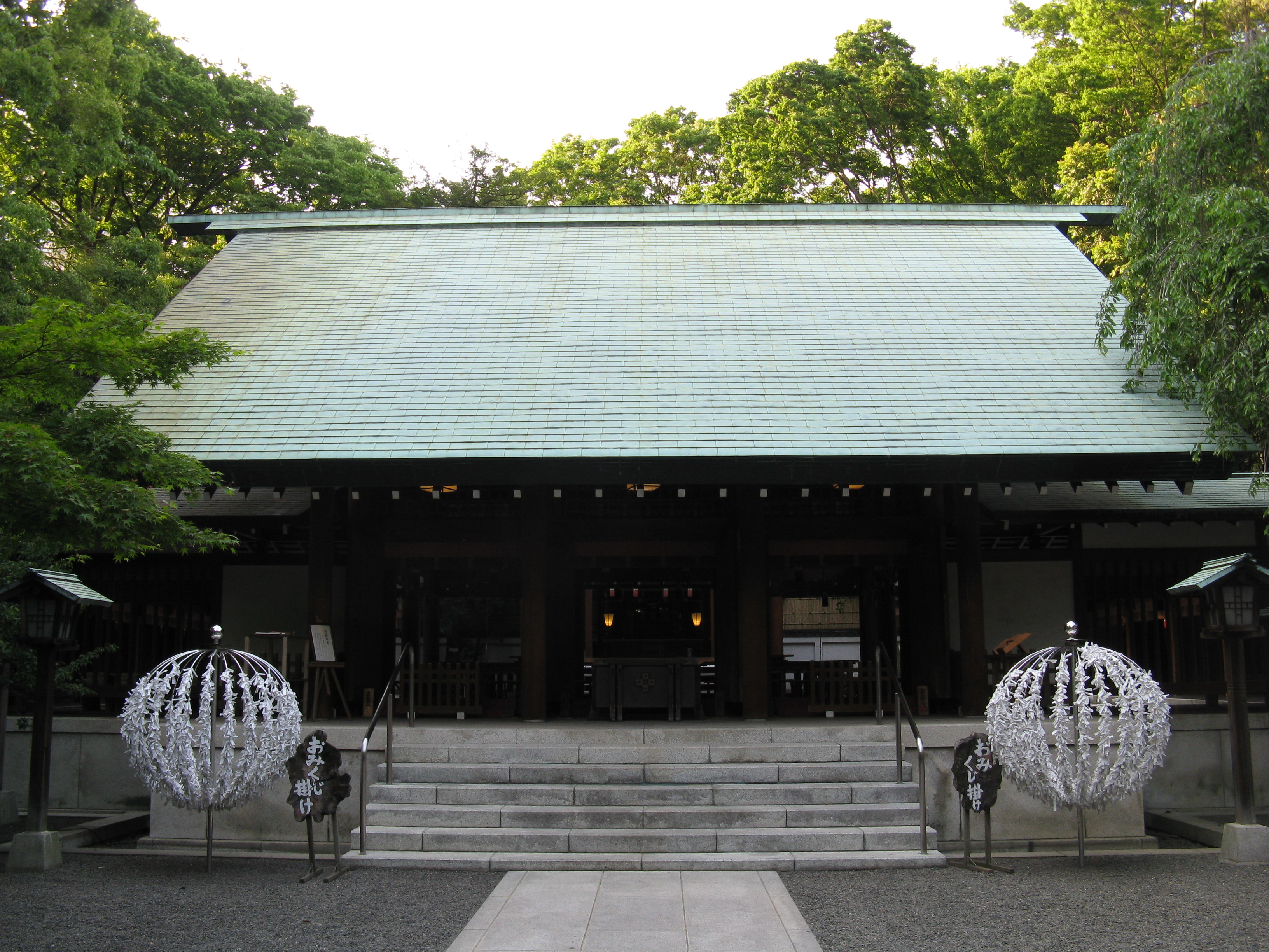 乃木神社 拝殿